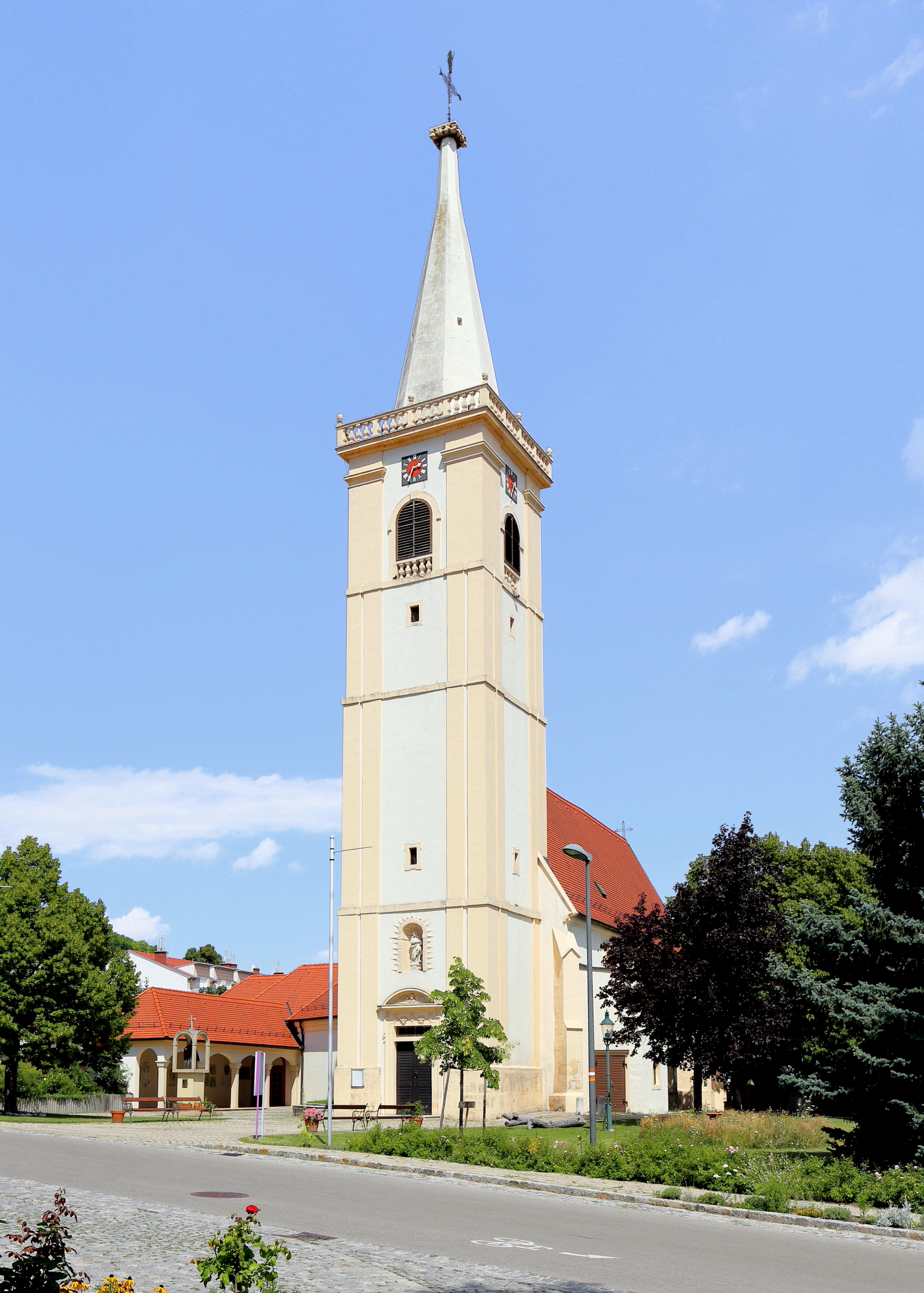 Südwestansicht der spätgotischen röm.-kath. Pfarrkirche hl. Johannes d. Täufer in der burgenländischen Marktgemeinde Großhöflein. Der vorgelagerte, viergeschossige Westturm mit Lisenengliederung wurde 1675 angebaut.